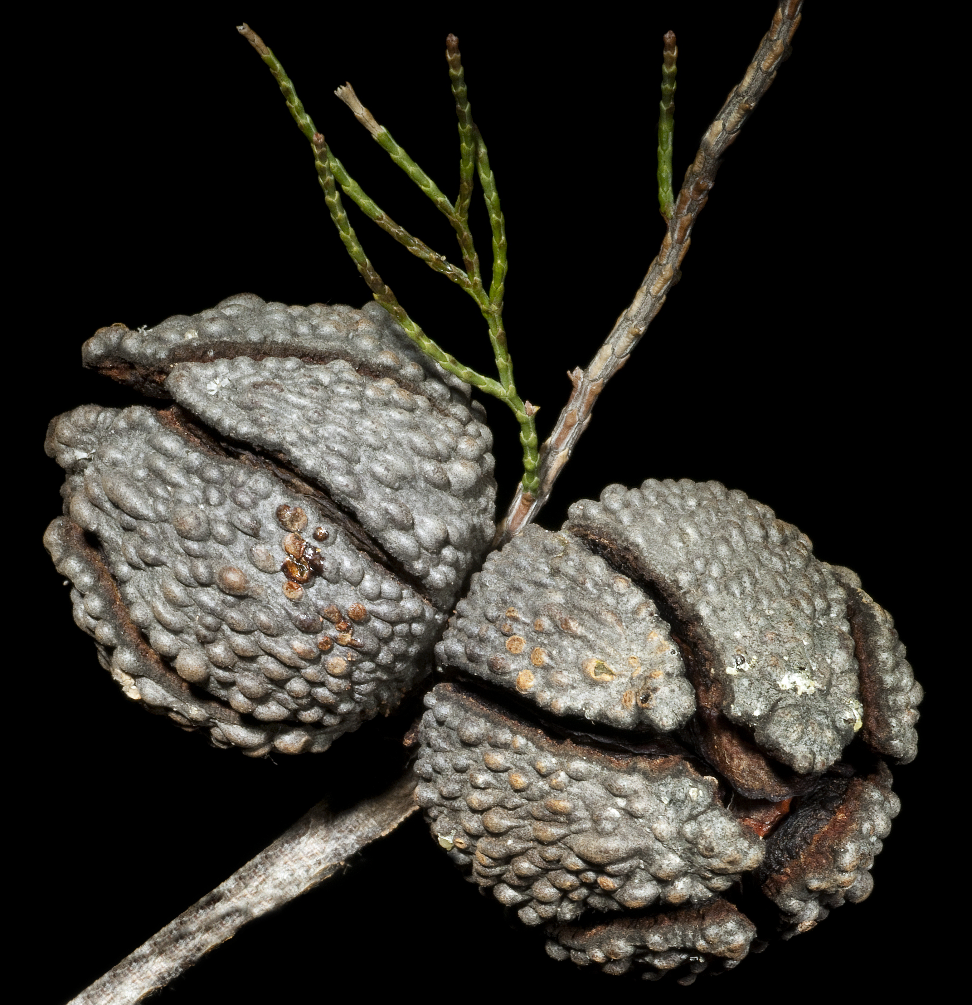 KRT4153